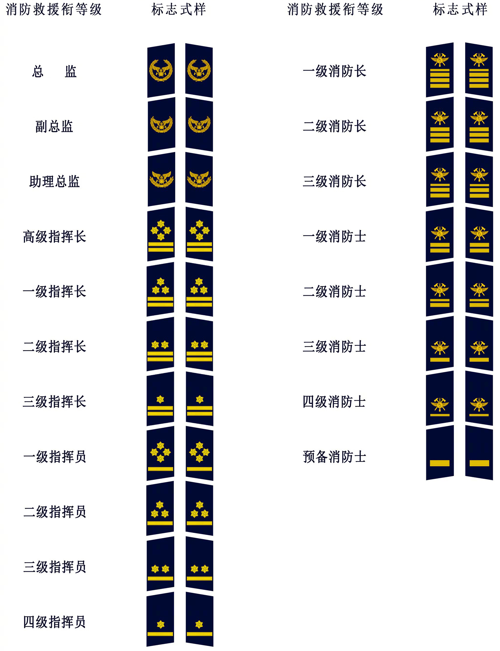 中华人民共和国消防救援衔领章